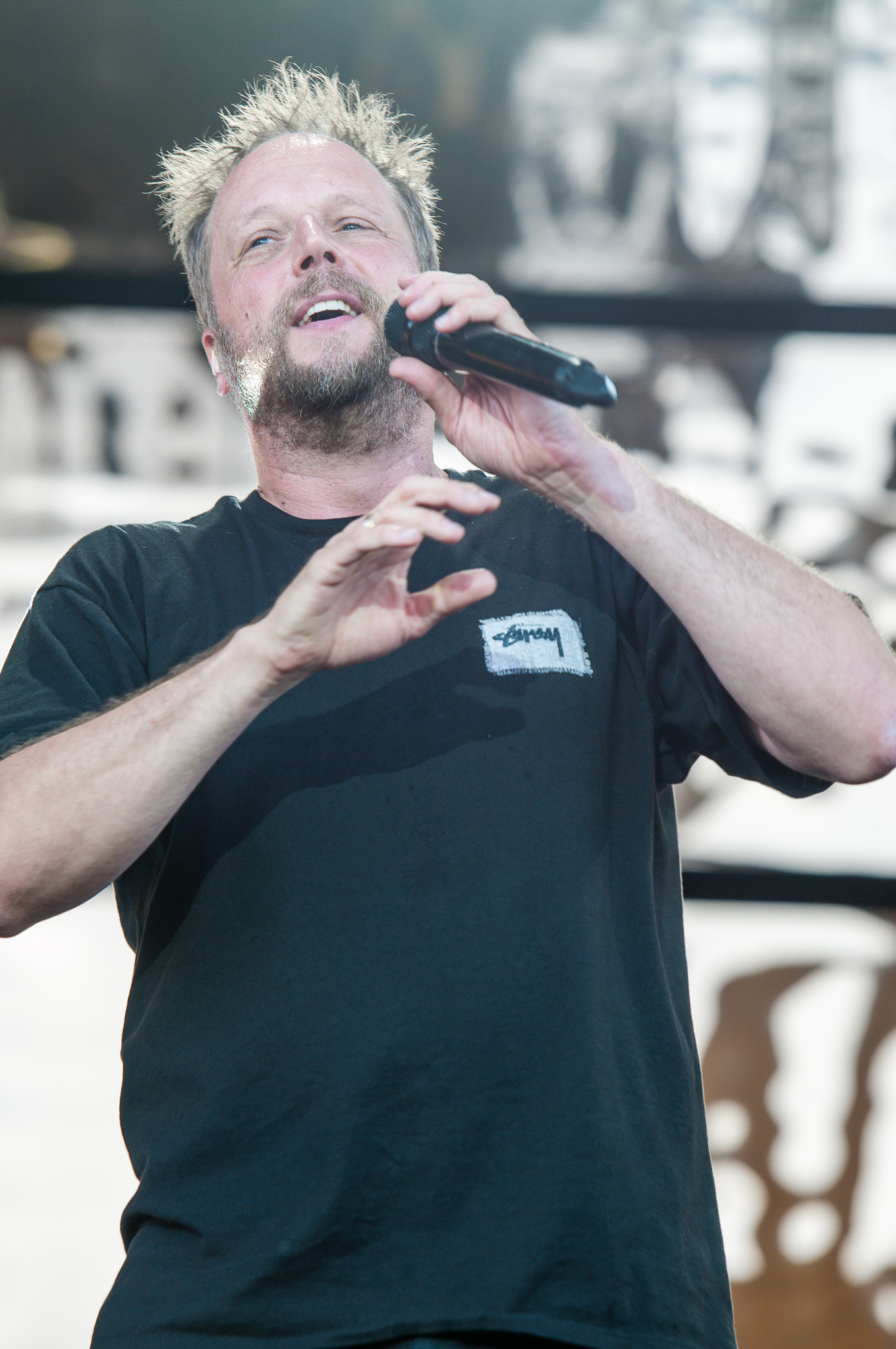 ARGO-Konzerte,Centerstage,Die fantastischen Vier,Fanta4,Konzert,Livekonzert,Livemusik,Michael Bernd Schmidt,Musik,RiP,Rock im Park 2014,Smudo